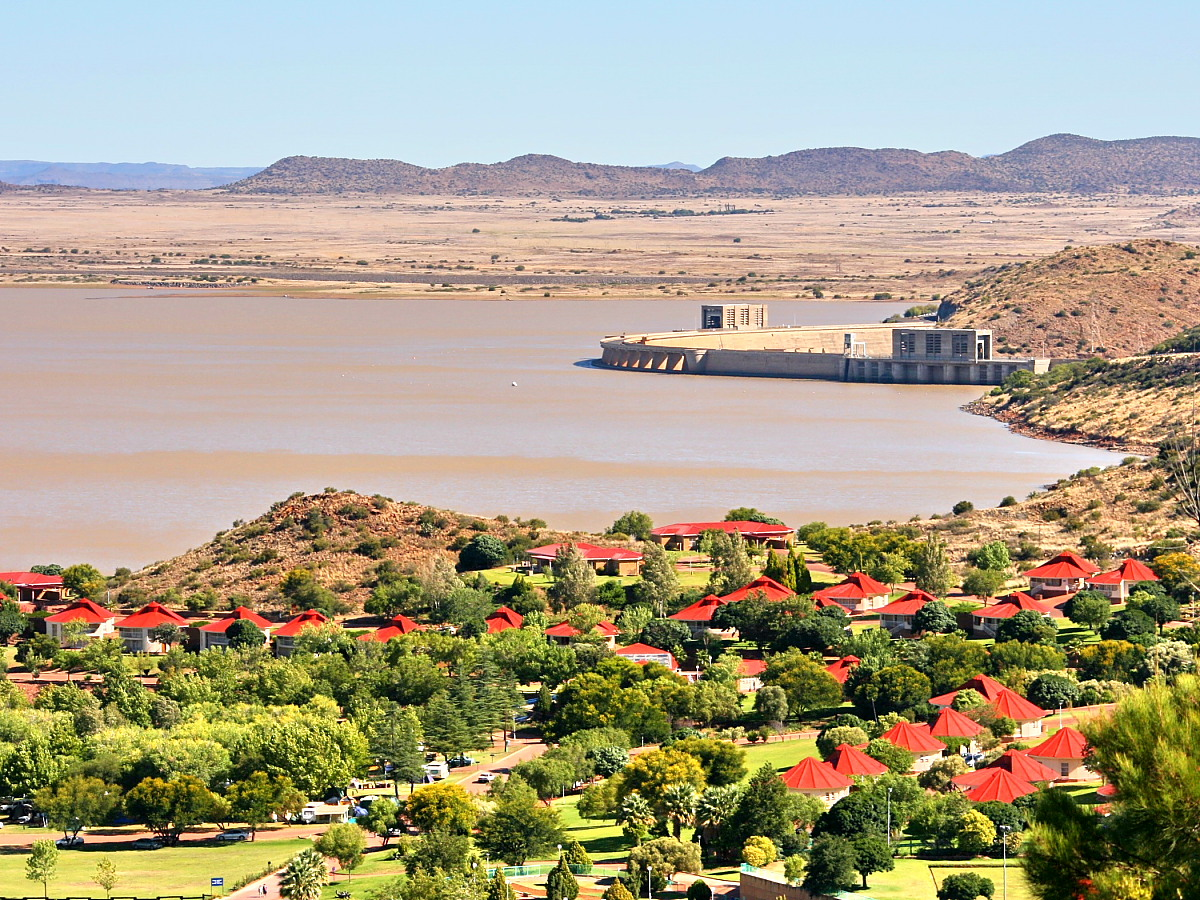 View over Gariep Dam